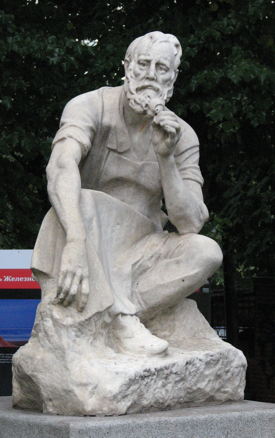 Скульптура «Рабочий сезонник»: Красные Ворота пл., Красносельский, Центральный округ, Москва